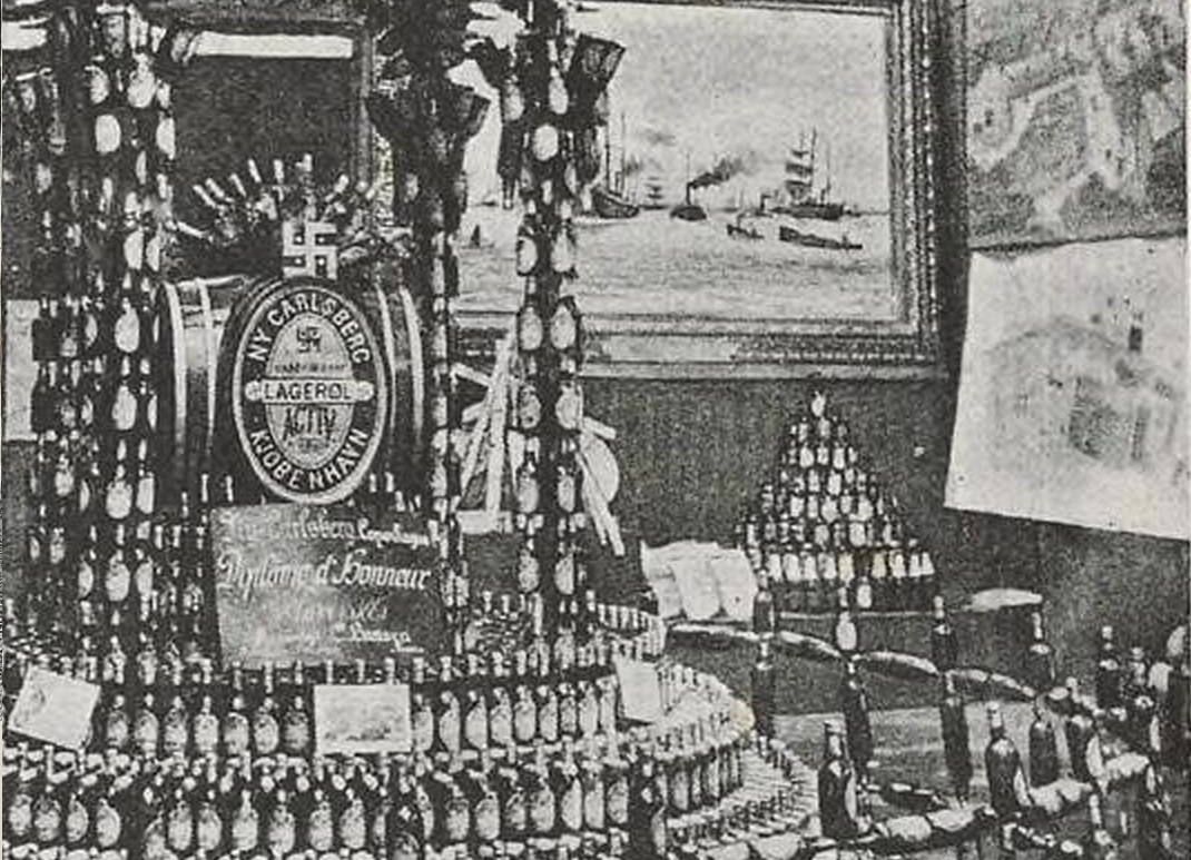 Exposition Universelle d'Anvers